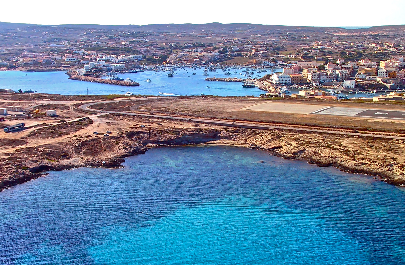 Sei stato a Lampedusa e hai immortalato le sue meraviglie mediterranee con il tuo obiettivo? Condividi la tua esperienza visiva nel gruppo Lampedusa in foto, la community Flickr dedicata alla bellissima isola siciliana con centinaia di foto e decine di lampedusani d'adozione. Questa foto è libera da vincoli di copyright.